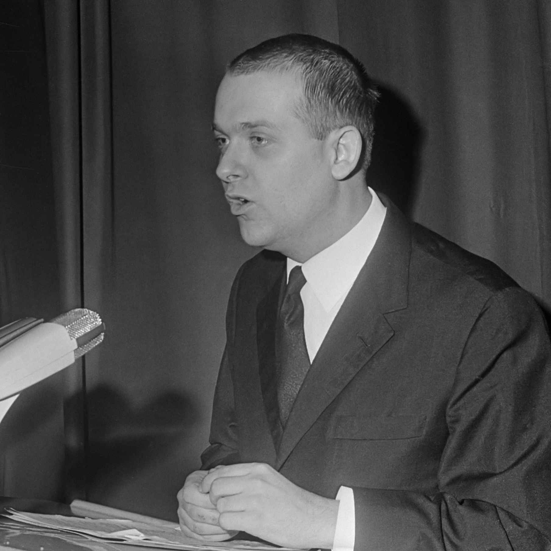 Studenten filmfestival Amsterdam geopend, Jan Nemec bij openingsrede 26 januari 1967